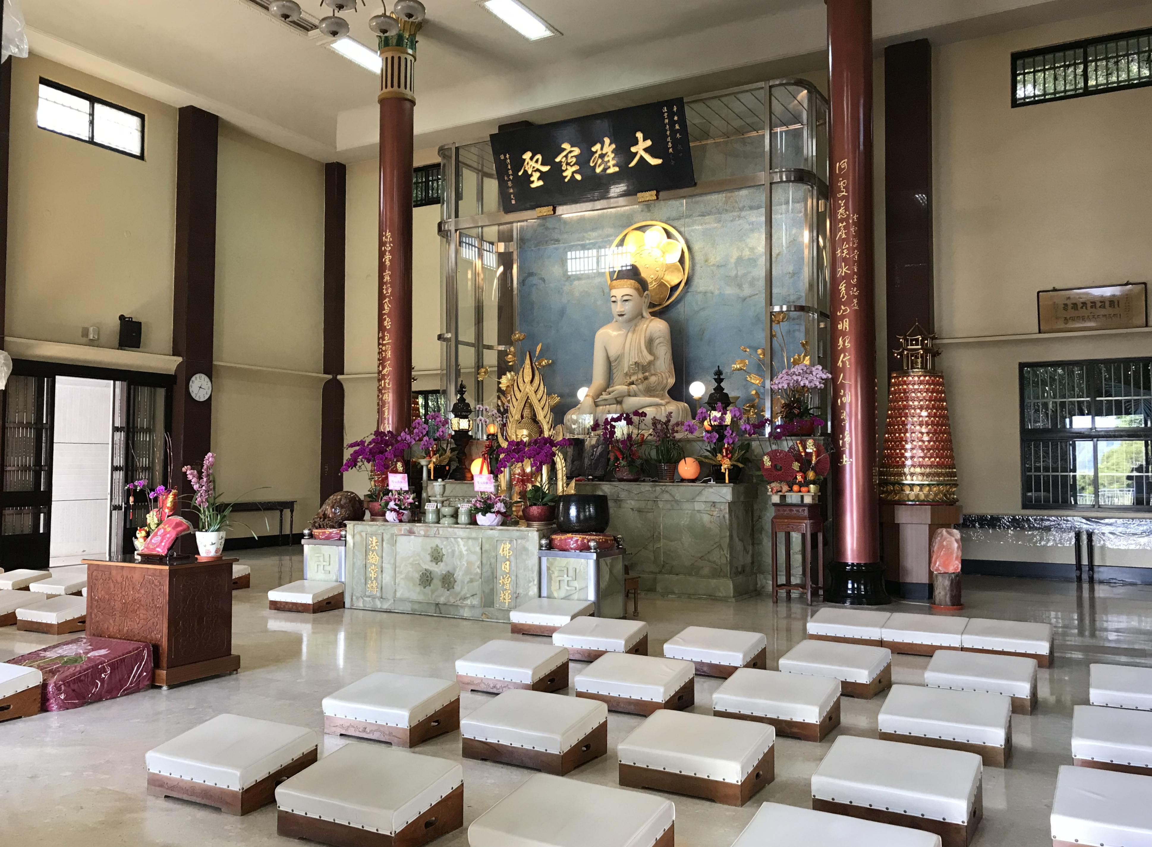 中文（台灣）: 大湖法雲禪寺大雄寶殿內释迦牟尼佛像